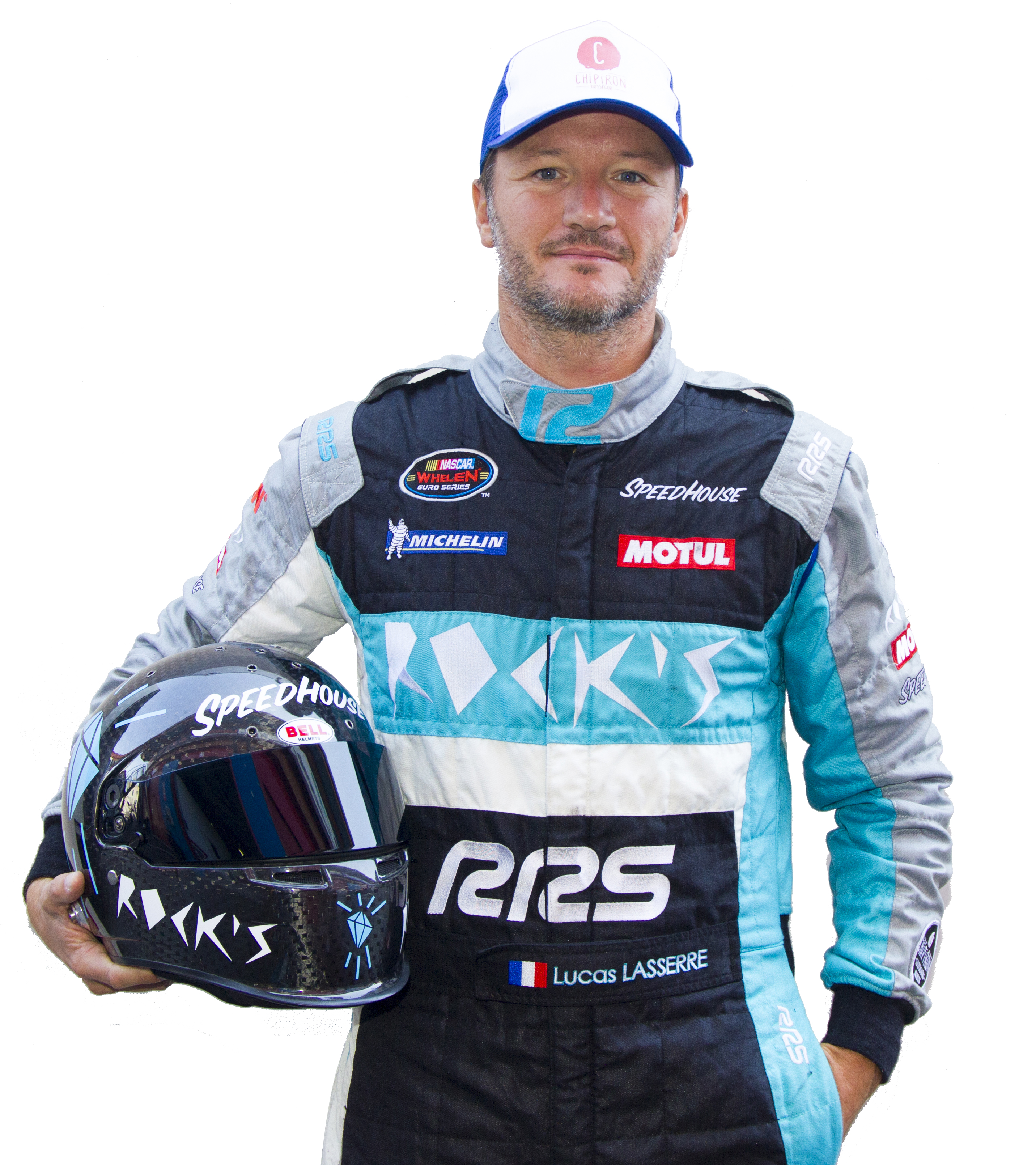 Lucas Lasserre sur le circuit de Franciacorta 2017